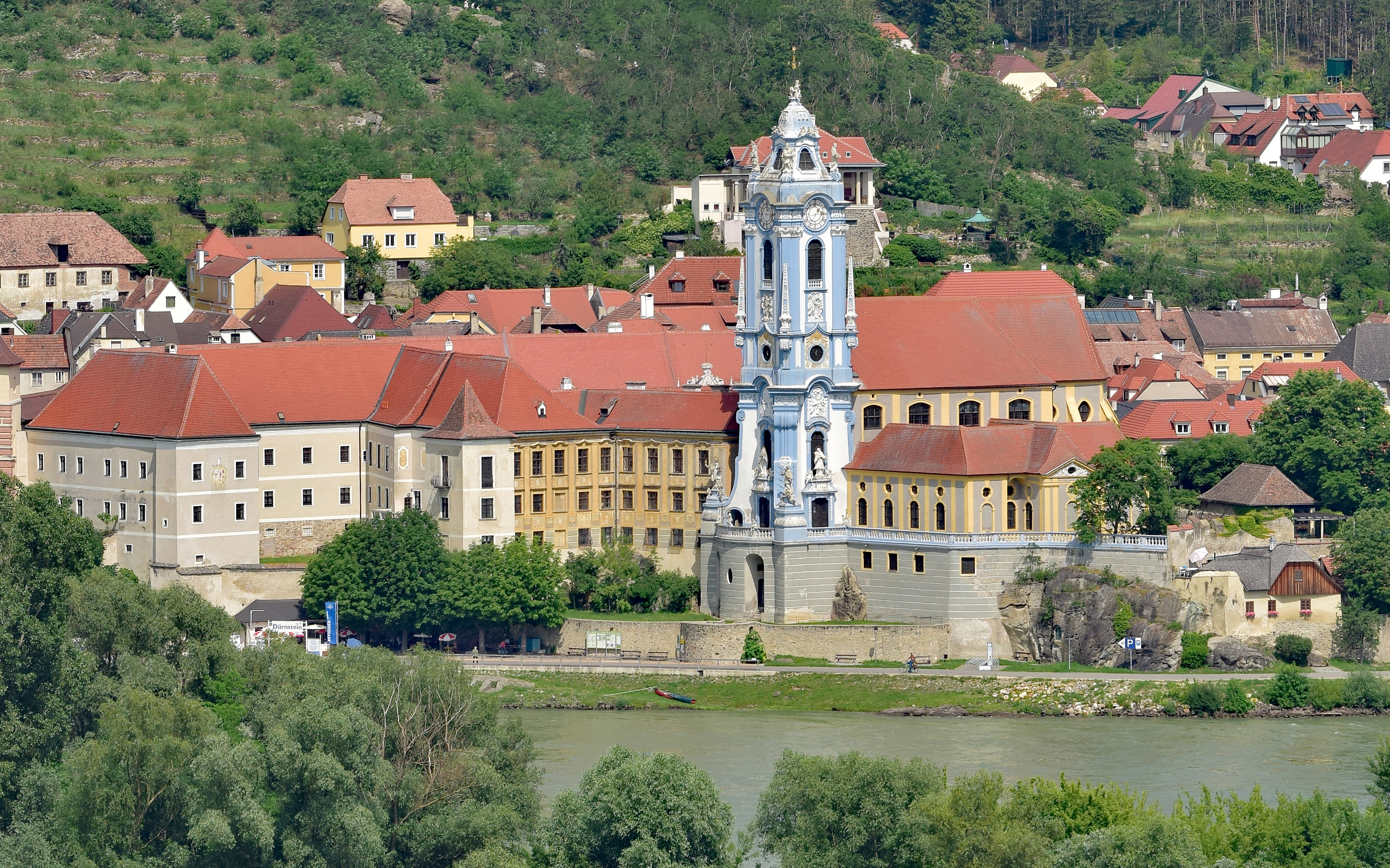 Augustinerchorherrenstift mit Kirche Maria Himmelfahrt und Stadtmauerteil